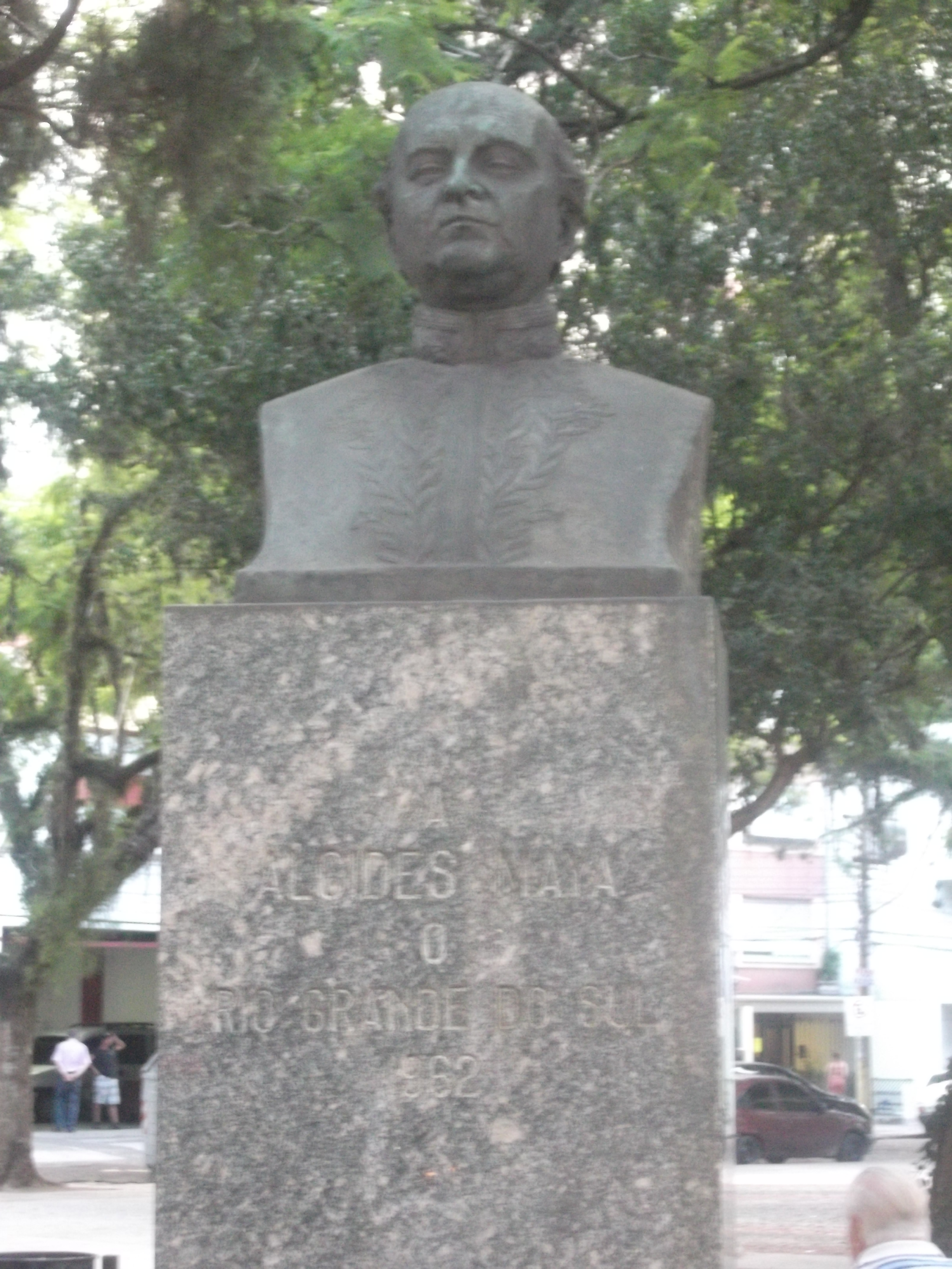 Praça General Daltro Filho, Porto Alegre, Brasil